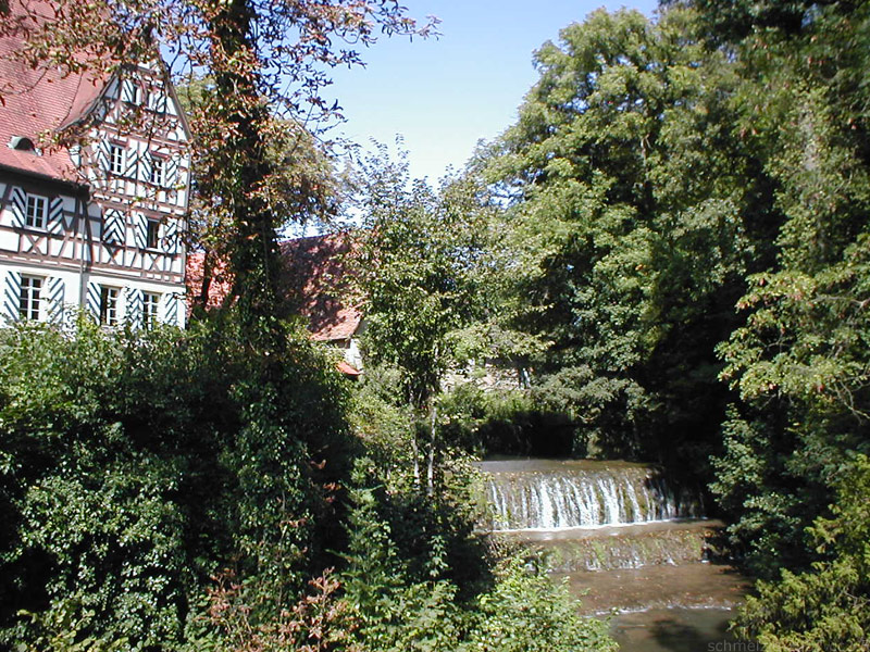 Kirnau-Wasserfall beim Oberschloss in Adelsheim